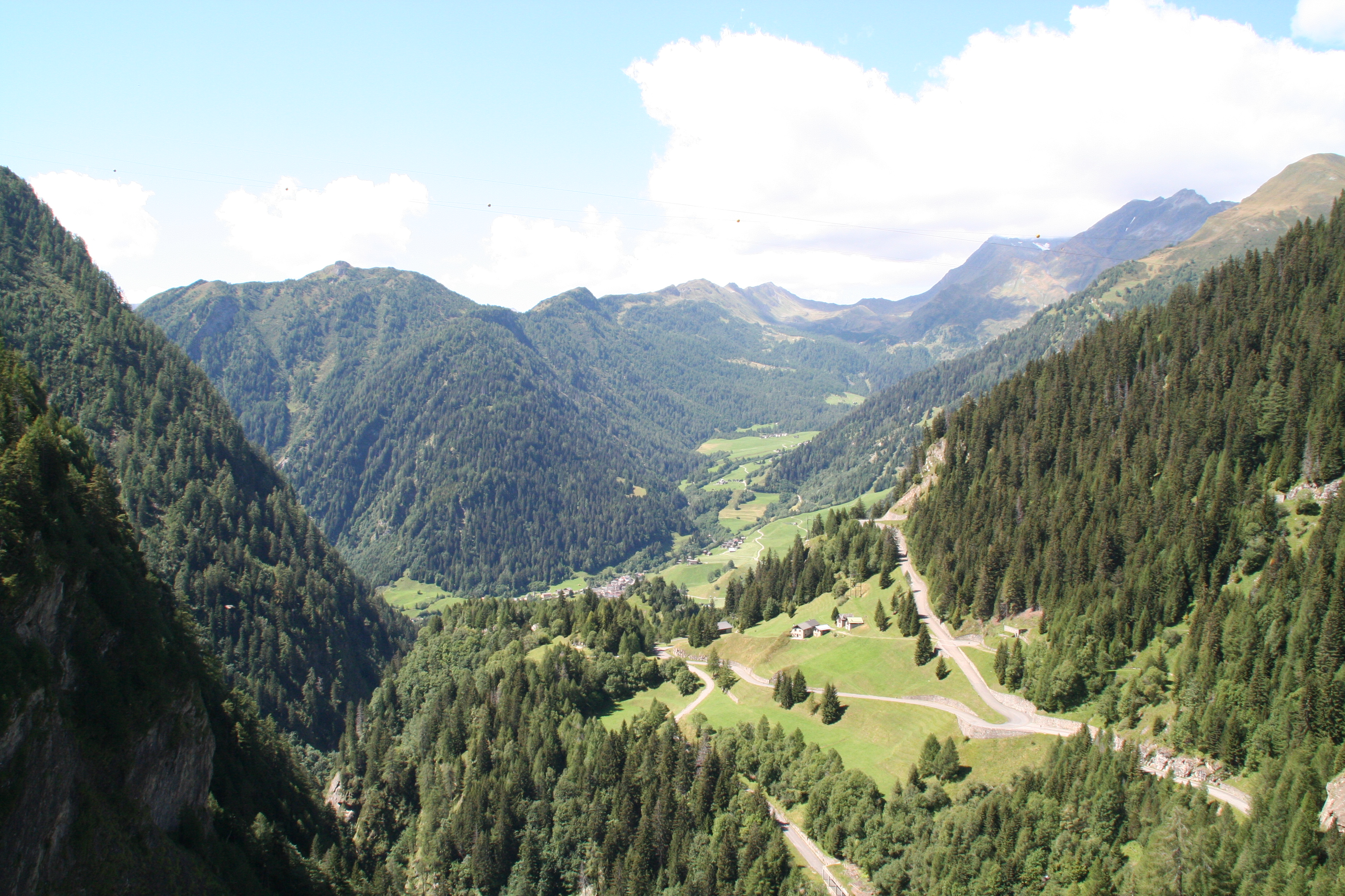 Campo (Blenio) Campo Blenio Val di Campo rechts hinten